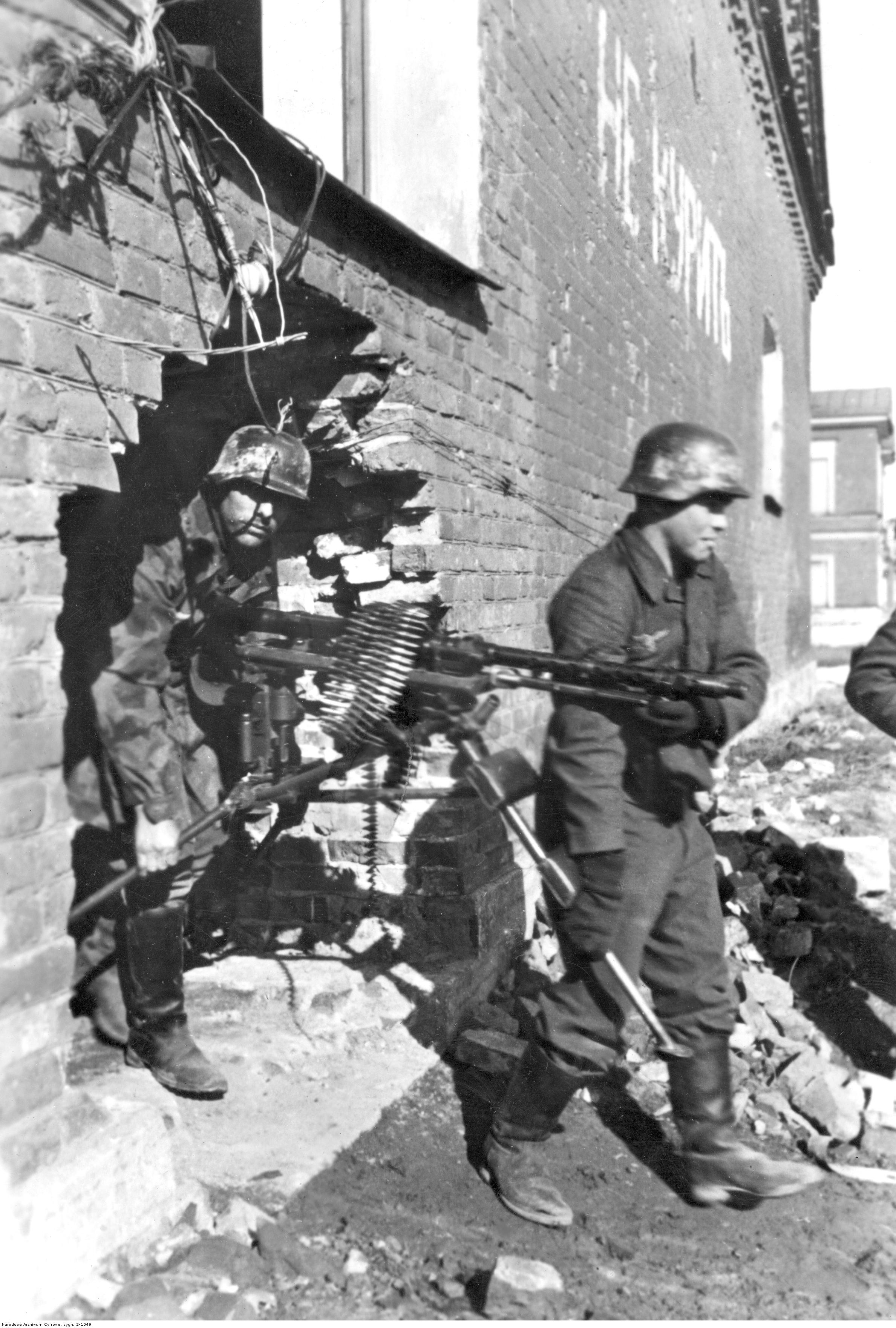 Dwaj żołnierze Luftwaffe z karabinem maszynowym MG 34 na podstawie trójnożnej przechodzą przez dziurę w ścianie. Widoczny napis cyrylicą na ścianie budynku. Front wschodni II wojny światowej, rok 1943.